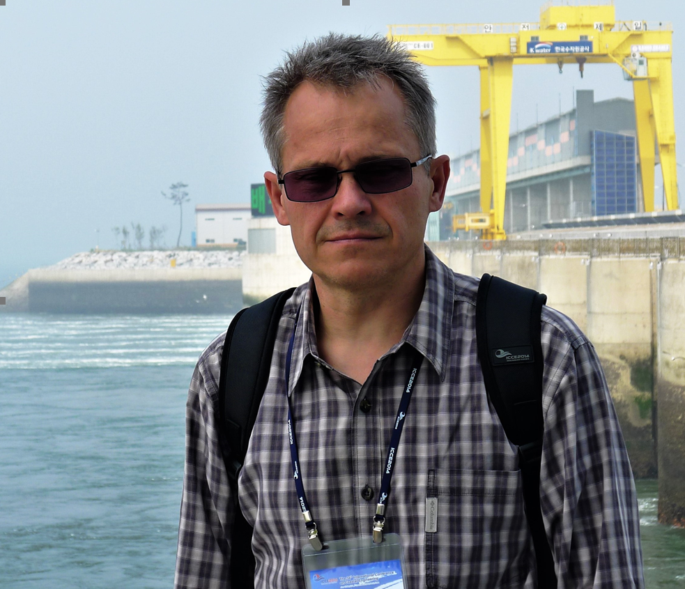 Ülo Suursaar 2014 Lõuna Koreas Sihwa loodeteelektrijaamas